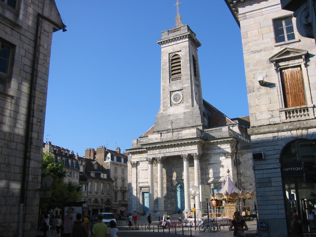 Église St Pierre de Besançon, construite selon les plans de Bertrand au XVIIIe Place du 8 Septembre